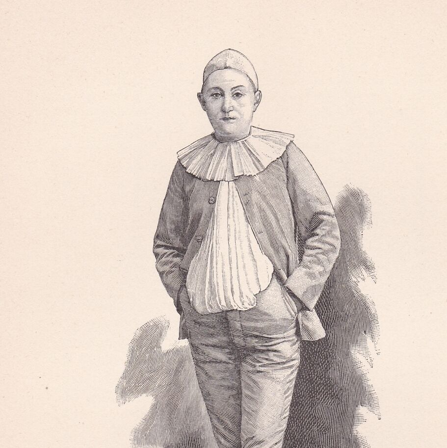 Félicia Mallet, gravure exécutée en 1894